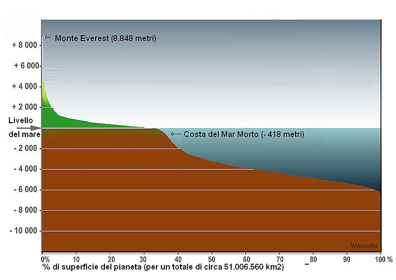 Distribuzione delle altitudini sulla Terra